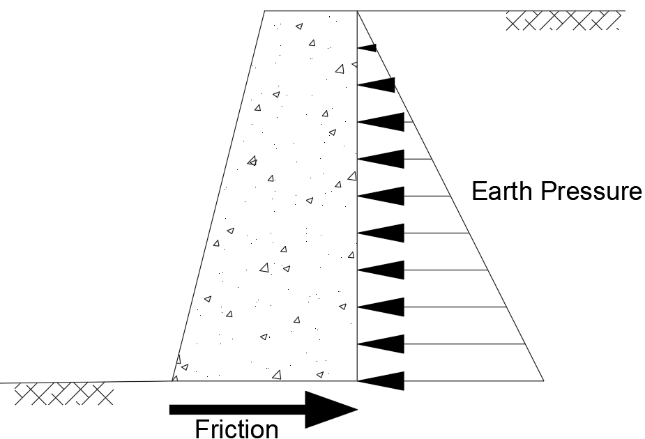 Earth pressure and friction of retaining wall